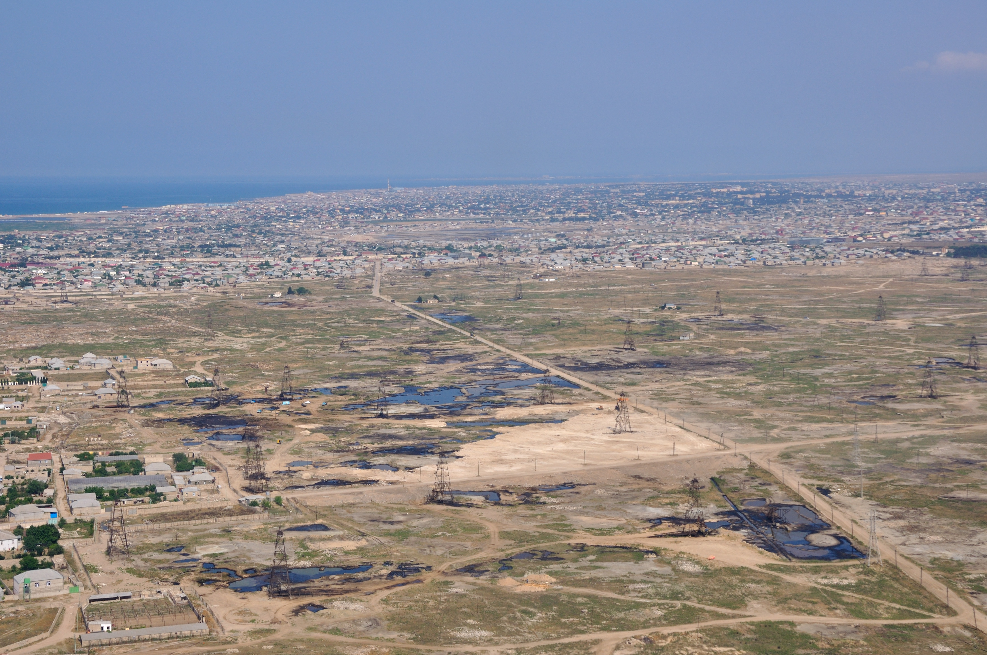 Azerbaijan, approach into Baku